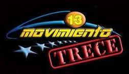 logo de la trece